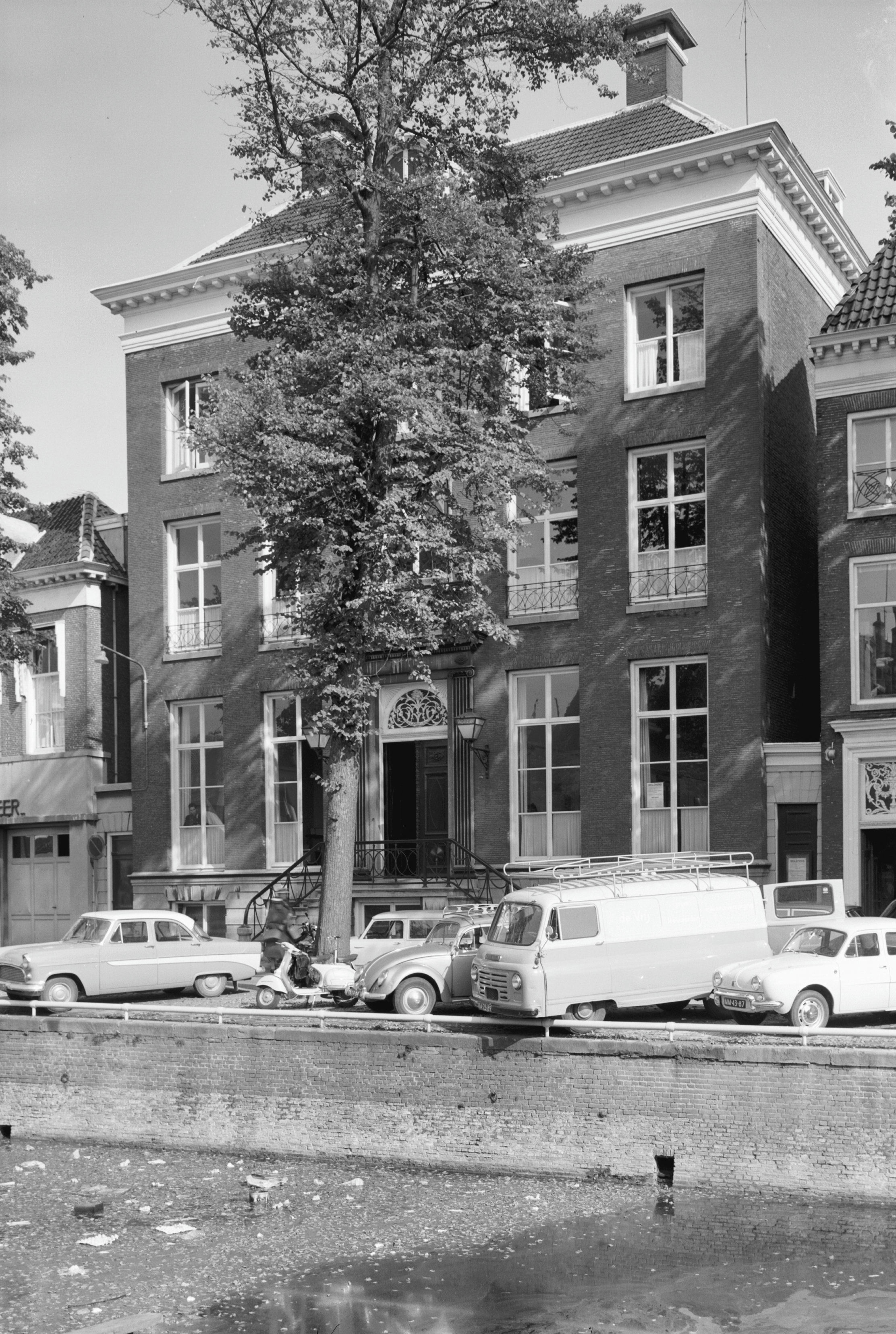 Politiebureau